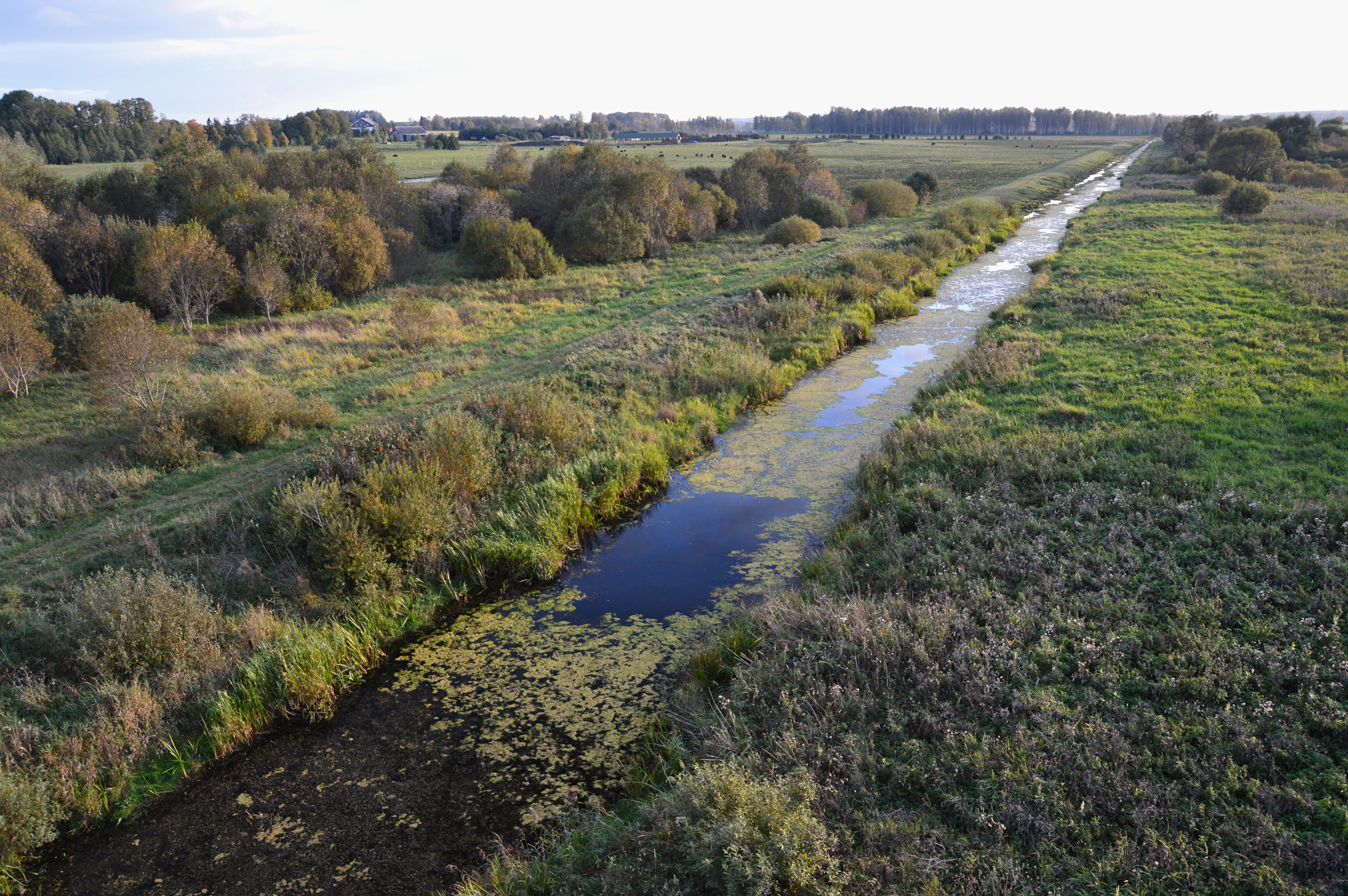 Ropka-Ihaste looduskaitseala.